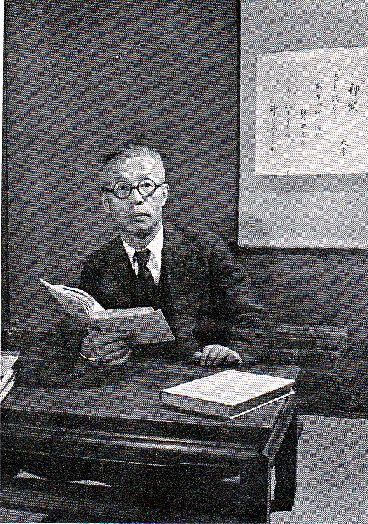 滝川政次郎